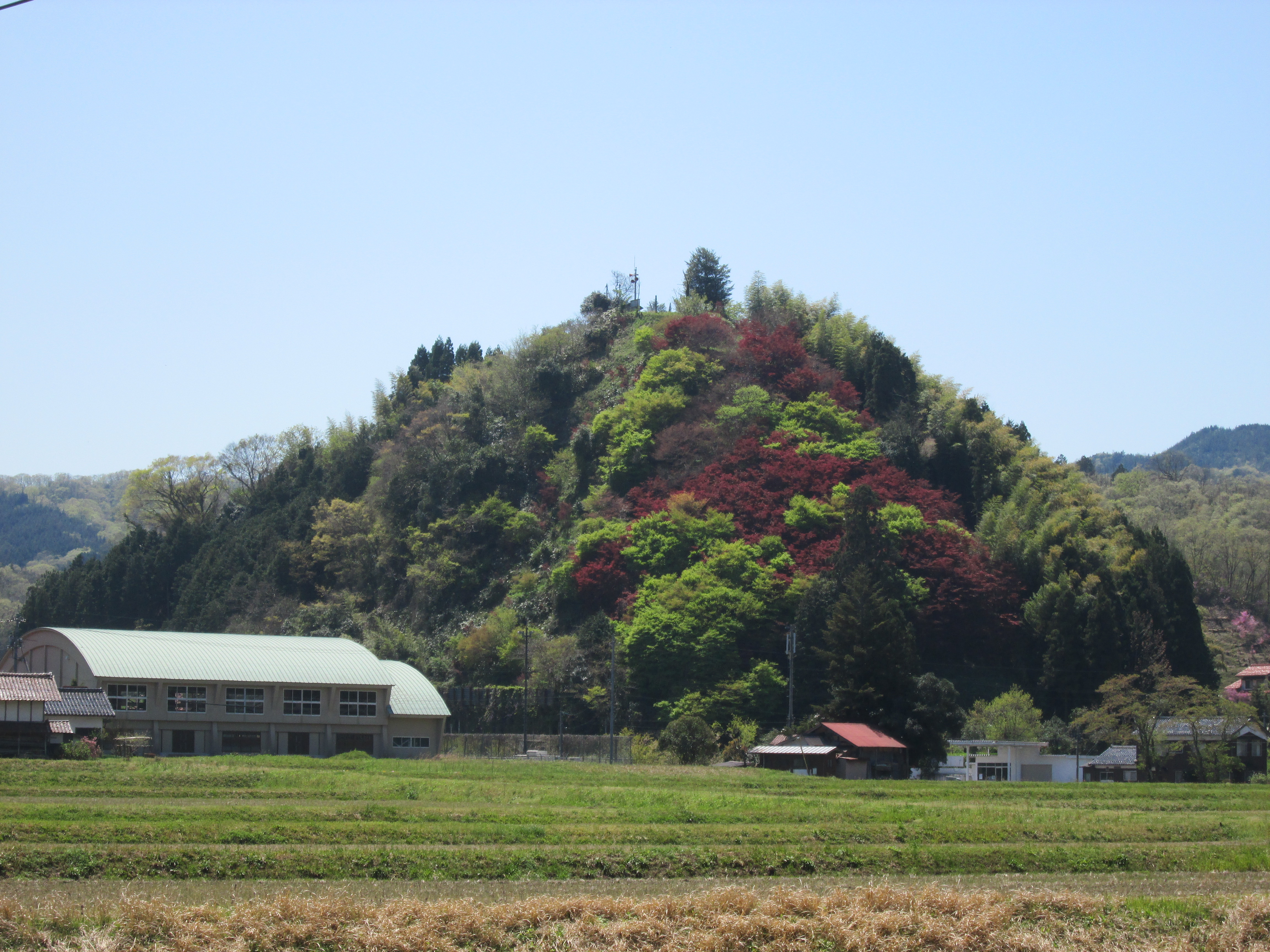 北東より撮影した布部の要害山。島根県安来市。布部山の戦いを参照。